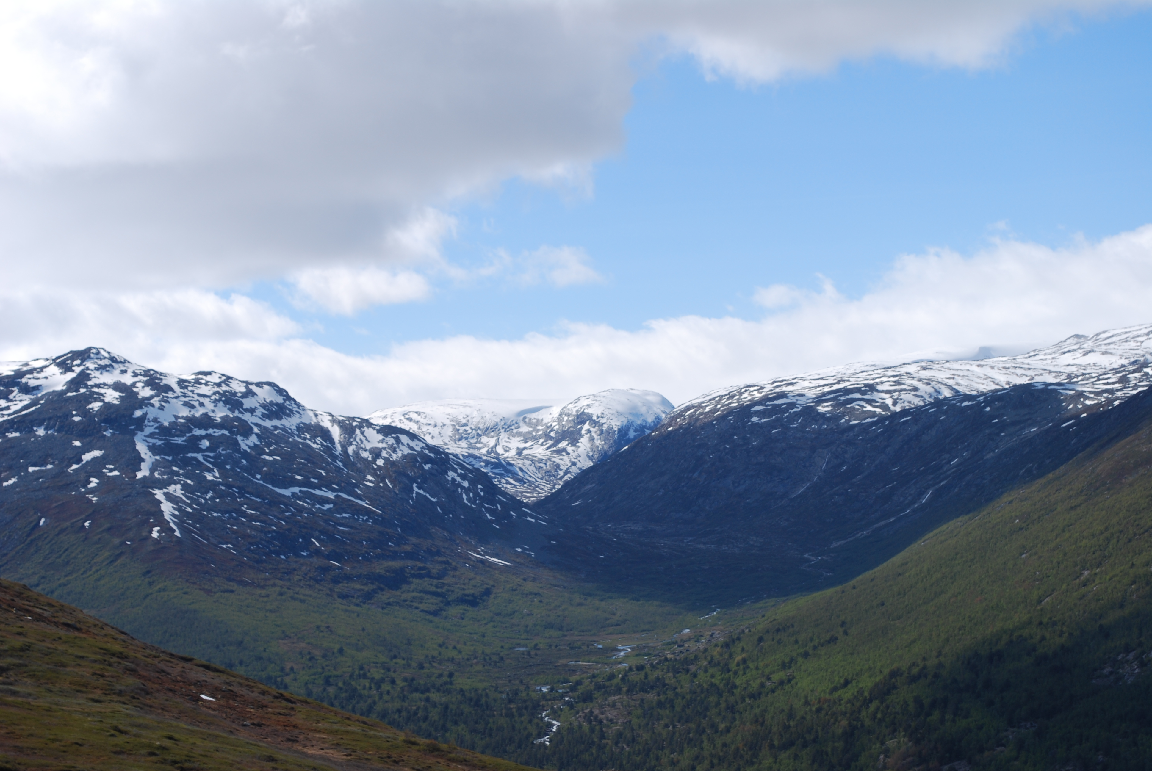 Mysubyttdalen i Skjåk kommune i Oppland, med Tverreggje til venstre og Leirvasshøi (1727 moh) i bakgrunnen midt i bildet.